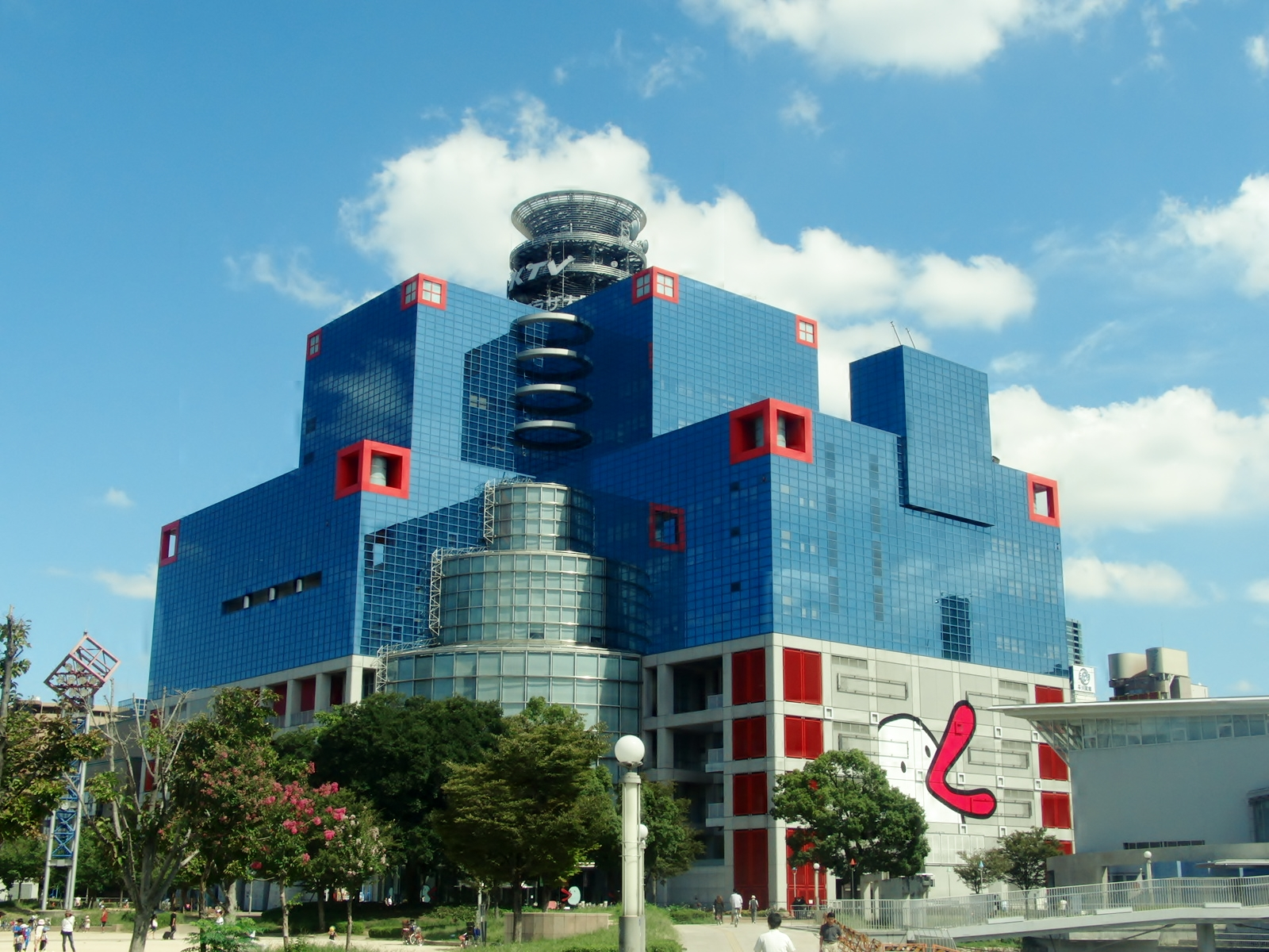 関西テレビ社屋